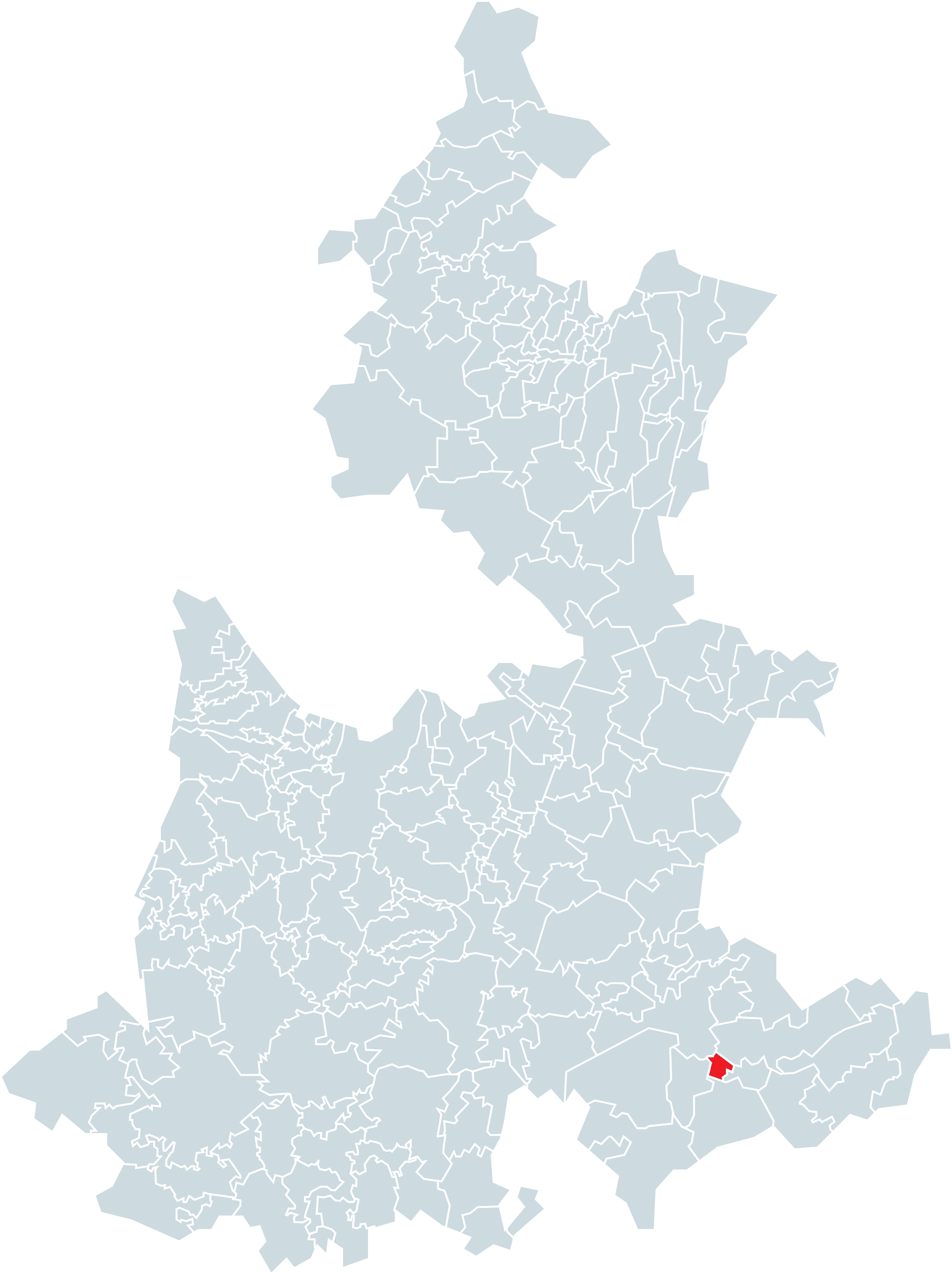 Municipio de Altepexi